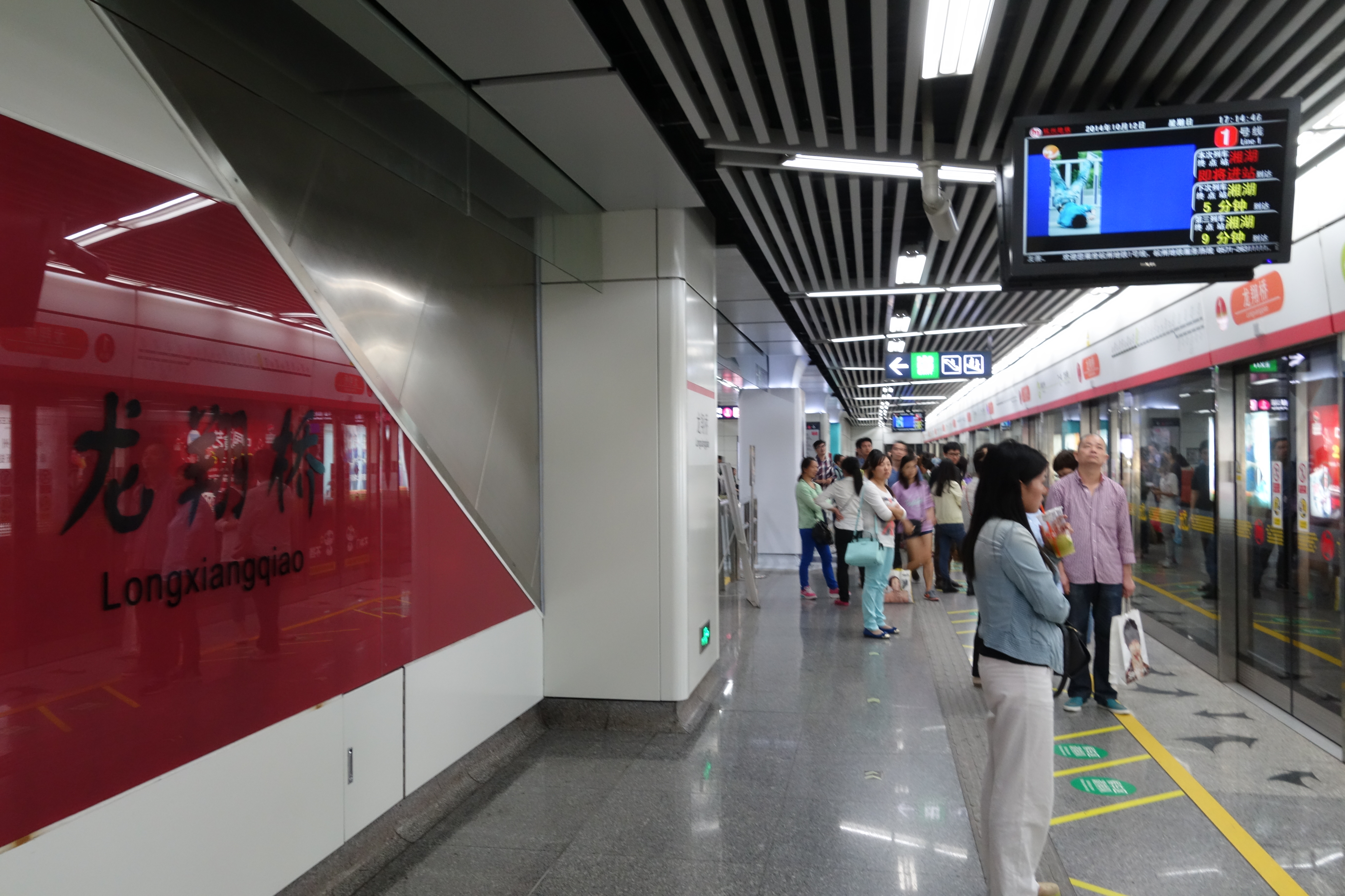 杭州地铁龙翔桥站